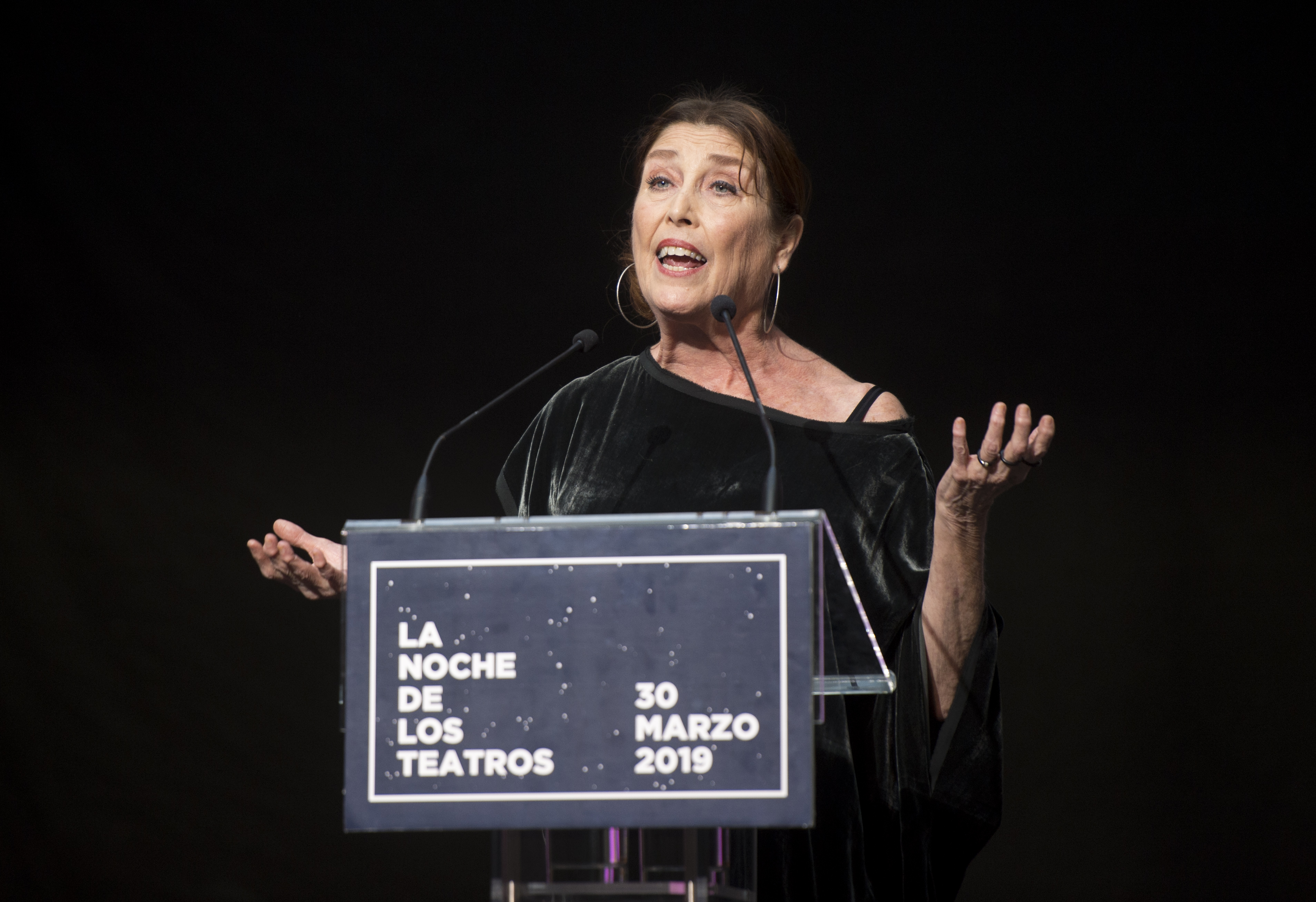 Pregón de La Noche de los Teatros 2019 por Verónica Forqué